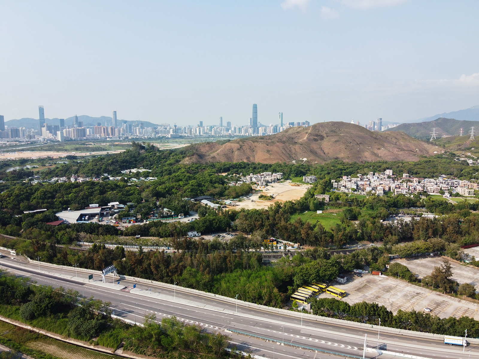 Pun Uk Tsuen & Chau Tau Tsuen